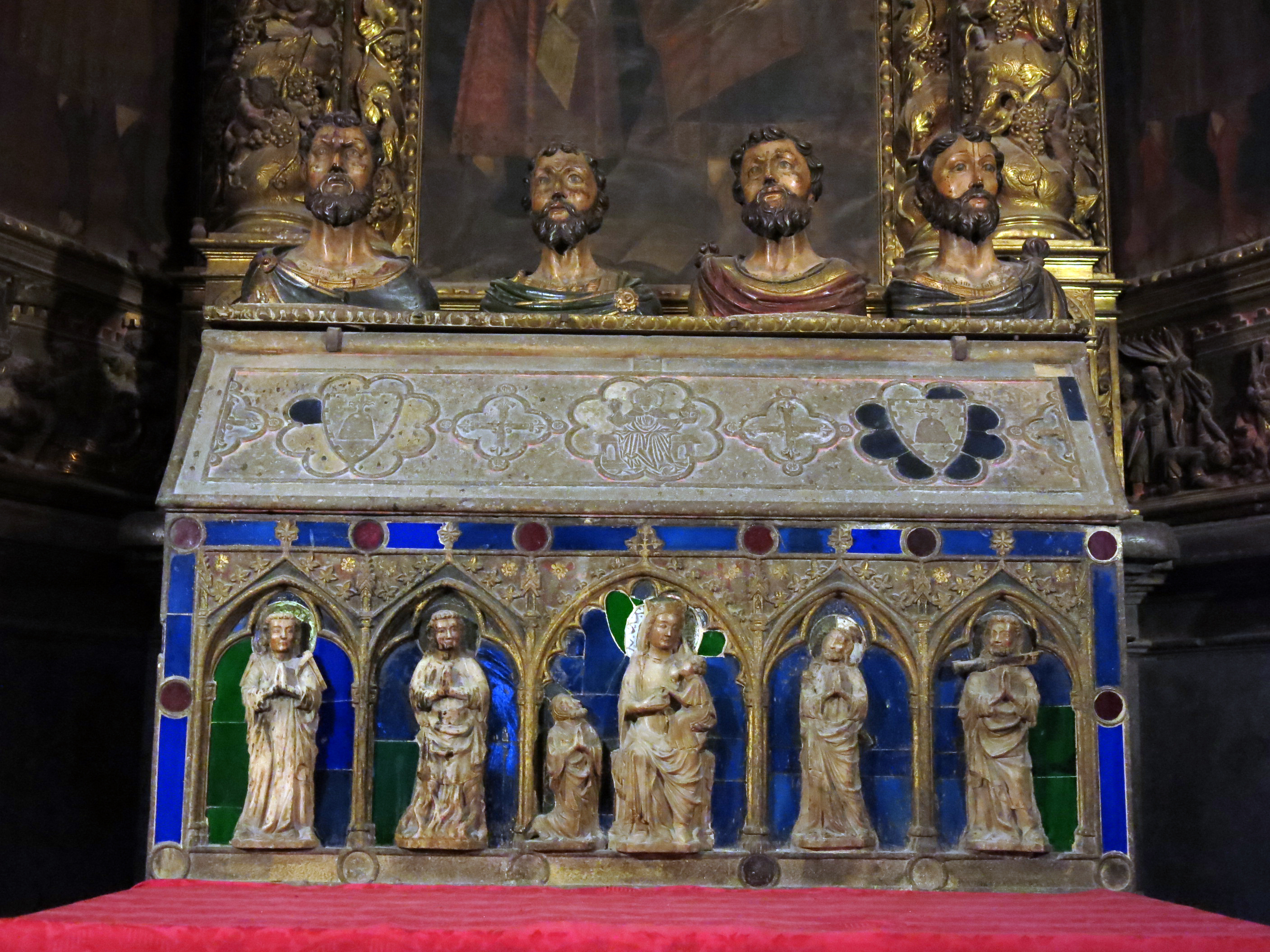 Catedral de Santa Maria (Girona)